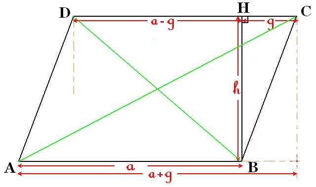 使用勾股定理证明平行四边形恒等式的辅助图